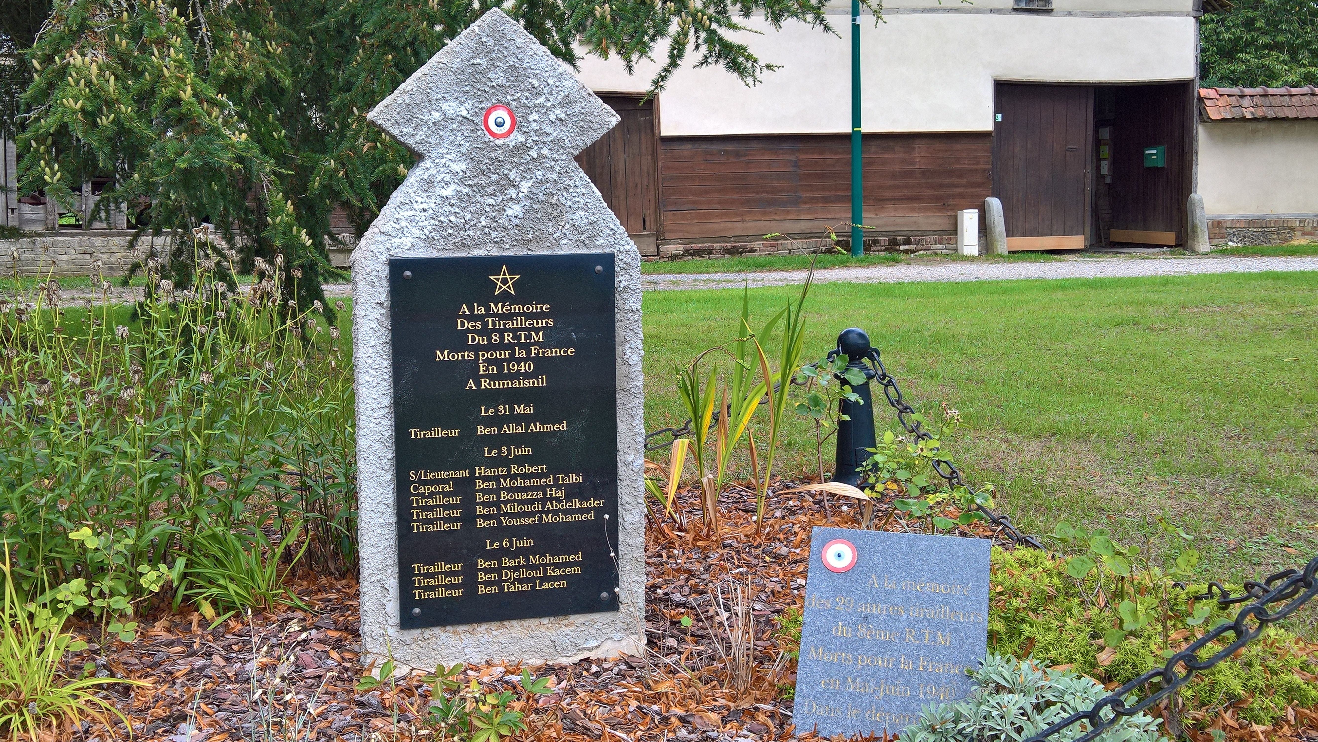 Namps-Maisnil (Rumaisnil) : Stèle commémorant le sacrifice de soldats du 8e régiment de tirailleurs marocains morts en défendant Rumaisnil lors de la Bataille de France, et petite plaque "A la mémoire des 29 autres tirailleurs du 8e RTM morts pour la France en mai-juin 1940 dans le département"